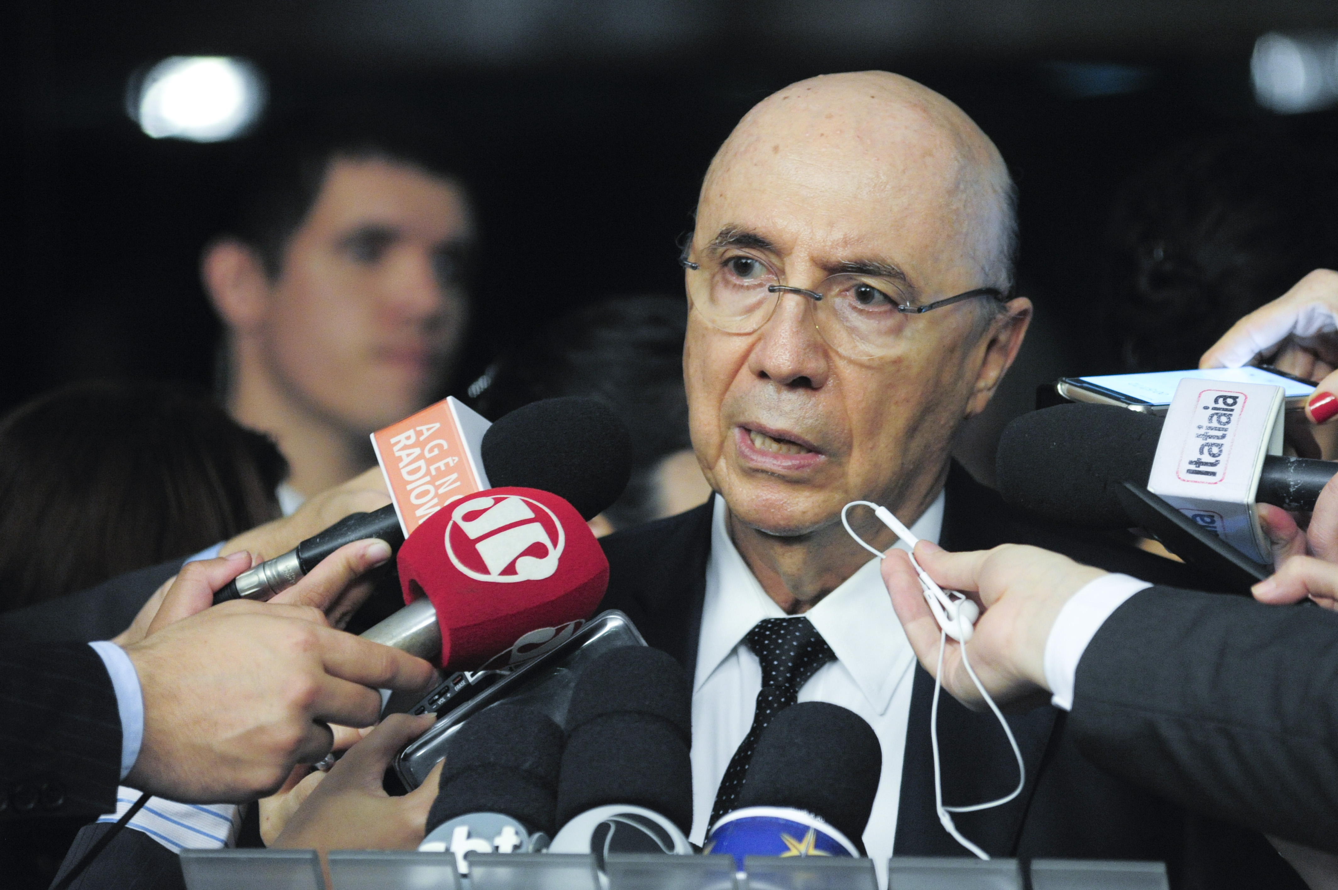 Ministro da Fazenda, Henrique Meirelles, concede entrevista. Foto: Geraldo Magela/Agência Senado